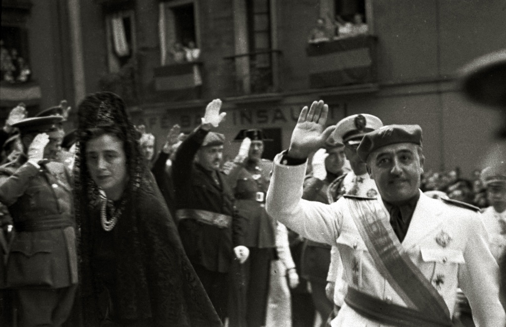 Título original: Llegada a la basílica de Santa María de Francisco Franco y su esposa, Carmen Polo, para asistir a un acto religioso (1/2) Localización: San Sebastián (Guipúzcoa)